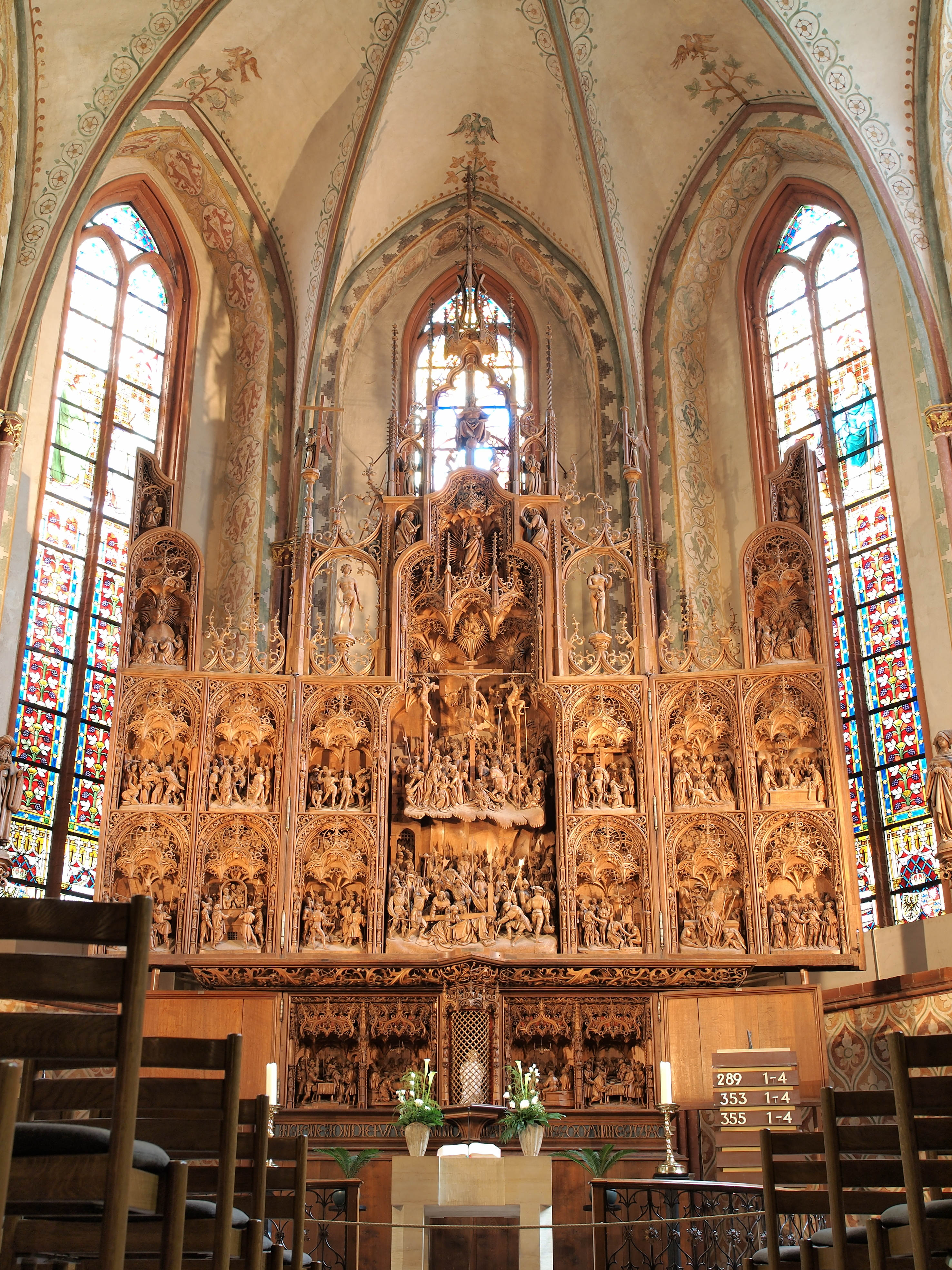 Bordesholmer Altar von Hans Brüggemann von 1521 im St. Petri Dom zu Schleswig, Ansicht von Westen